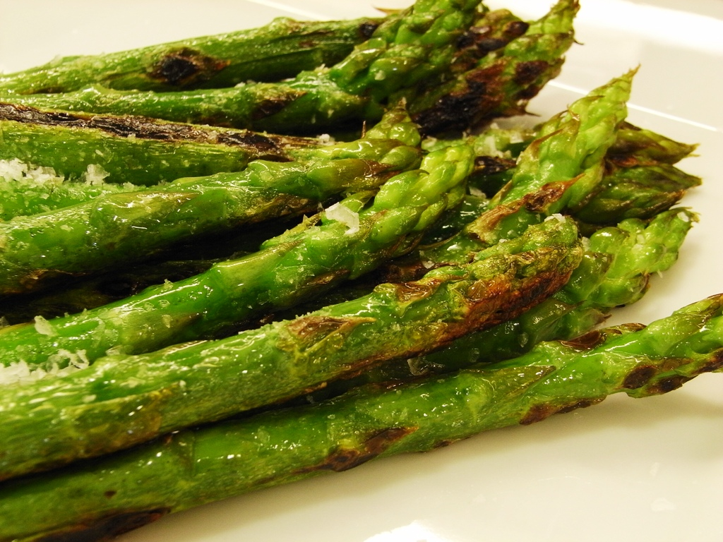 Espárragos trigueros a la plancha.